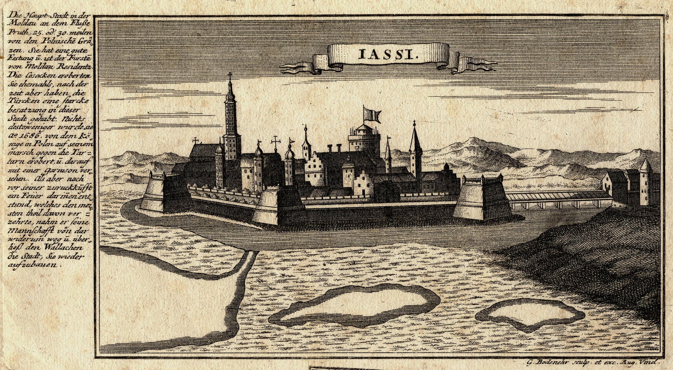 Iassi (Iași)